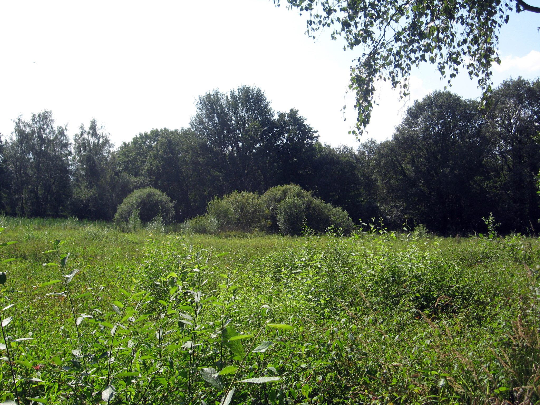 Natuurgebied Het Welleke in Zonhoven; sinds 1981 beschermd erfgoed